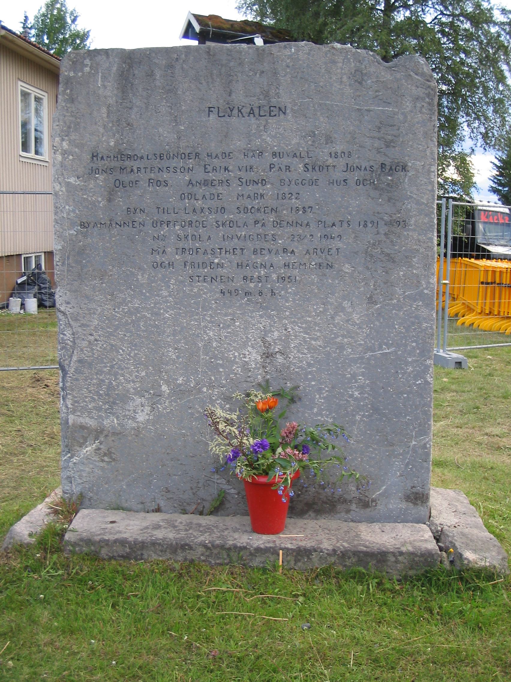 Stenen i Flykälen.